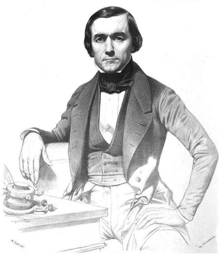 "M. Barre père par Amaury-Duval".